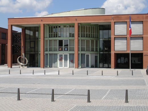 Mairie de Saint-Louis